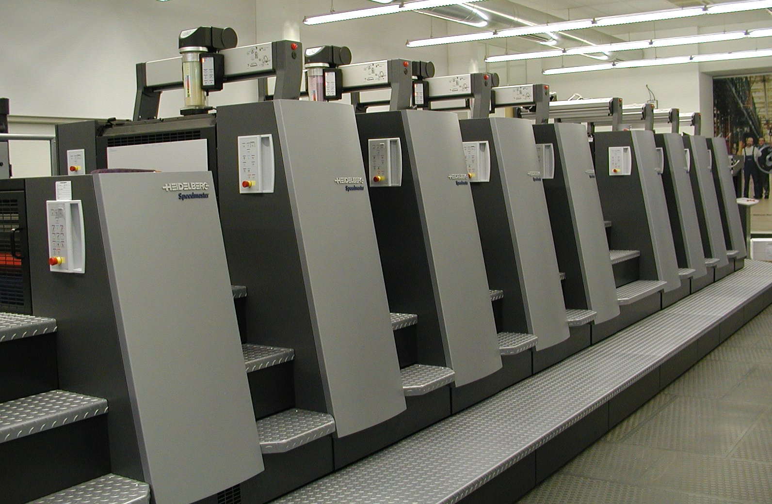 "Speedmaster CD 74" eine Druckmaschine der Firma Heidelberger Druckmaschinen mit 8 Druckwerken, Wendung und Lackwerk